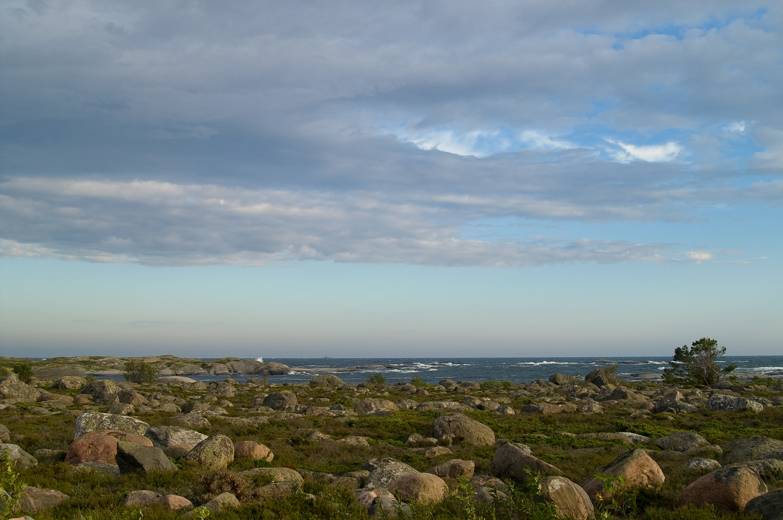 Utö, Länsi-Turunmaa.